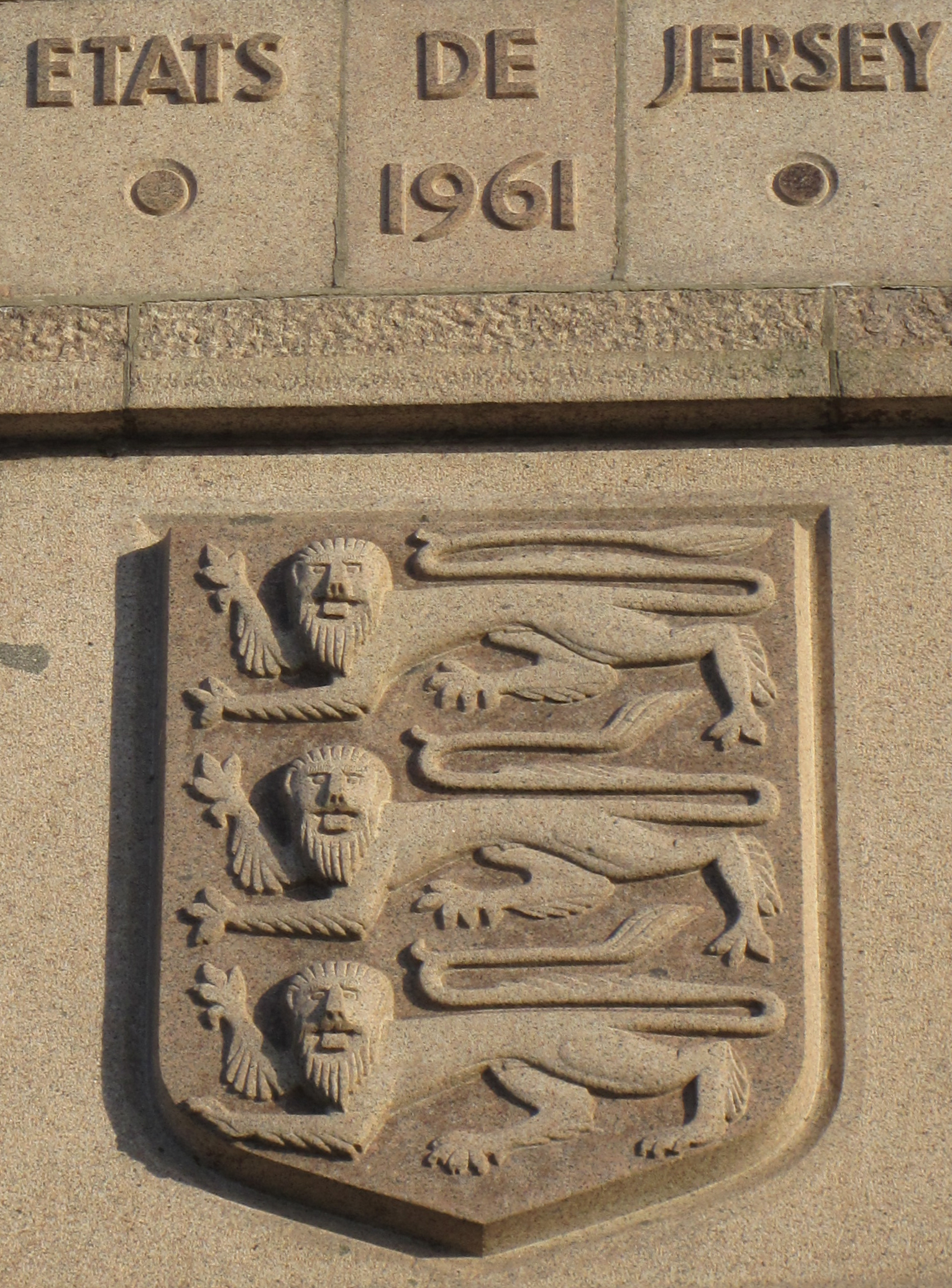 Nrf: Êtchusson d'Jèrri, 1961, au P'tit Mont, Saint Hélyi, Jèrri